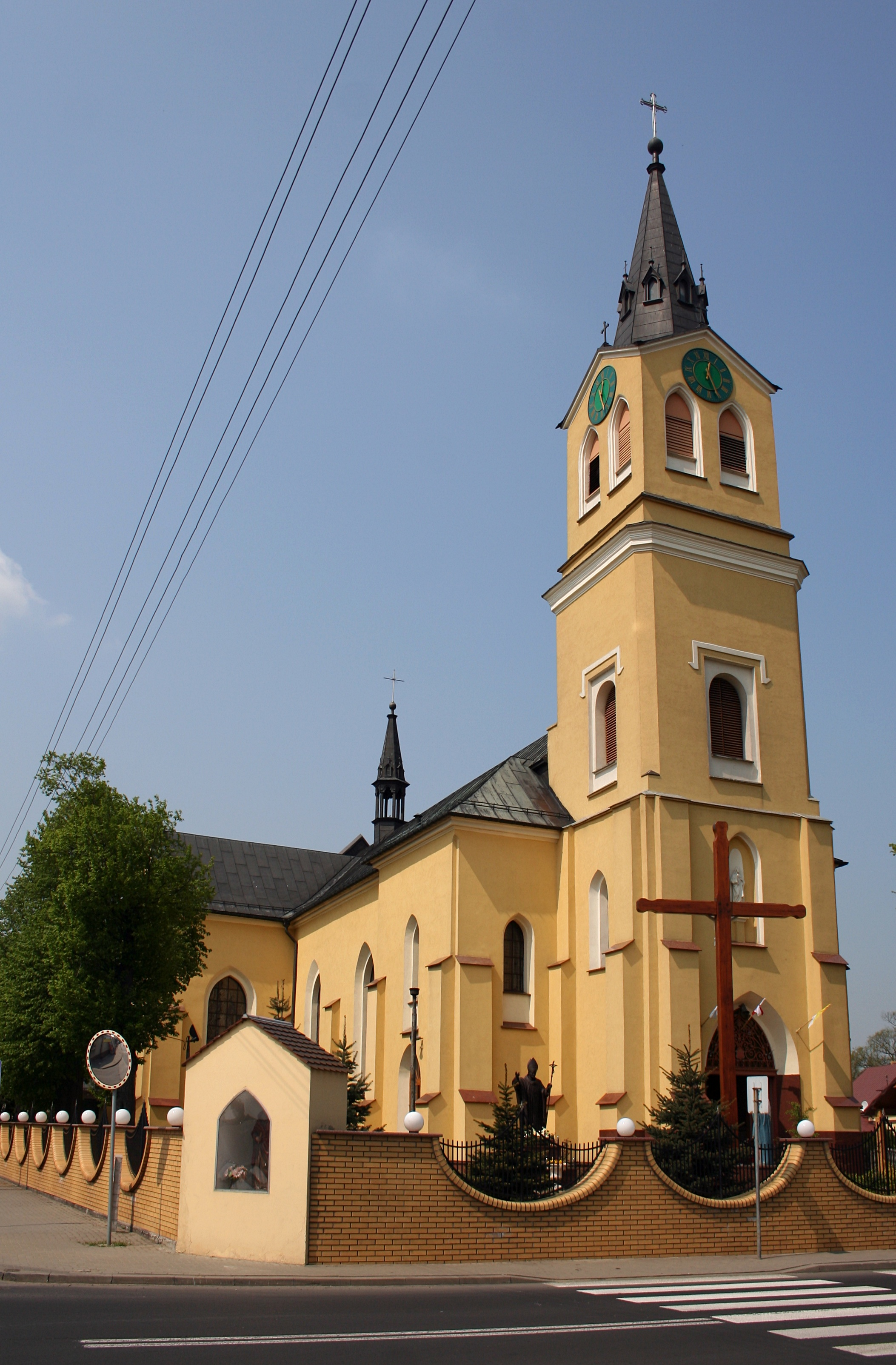 Kościół św. Katarzyny w Miedźnie, woj. śląskie